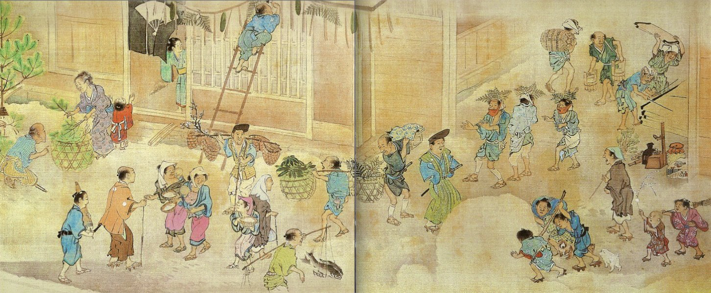 Le Nouvel An est une œuvre du peintre japonais Maruyama Ōkyo, au XVIIIe siècle. Rouleau portatif, couleurs sur soie, H.: 28 centimètres. Cette peinture est conservée au Tokugawa Reimeikai (Musée d'Art Tokugawa) à Tokyo.